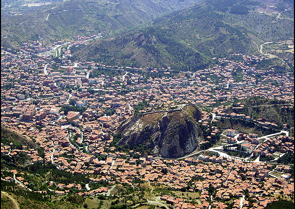 Yivlik Kayası'ndan kuşbakışı ortada Kale ve İskilip.